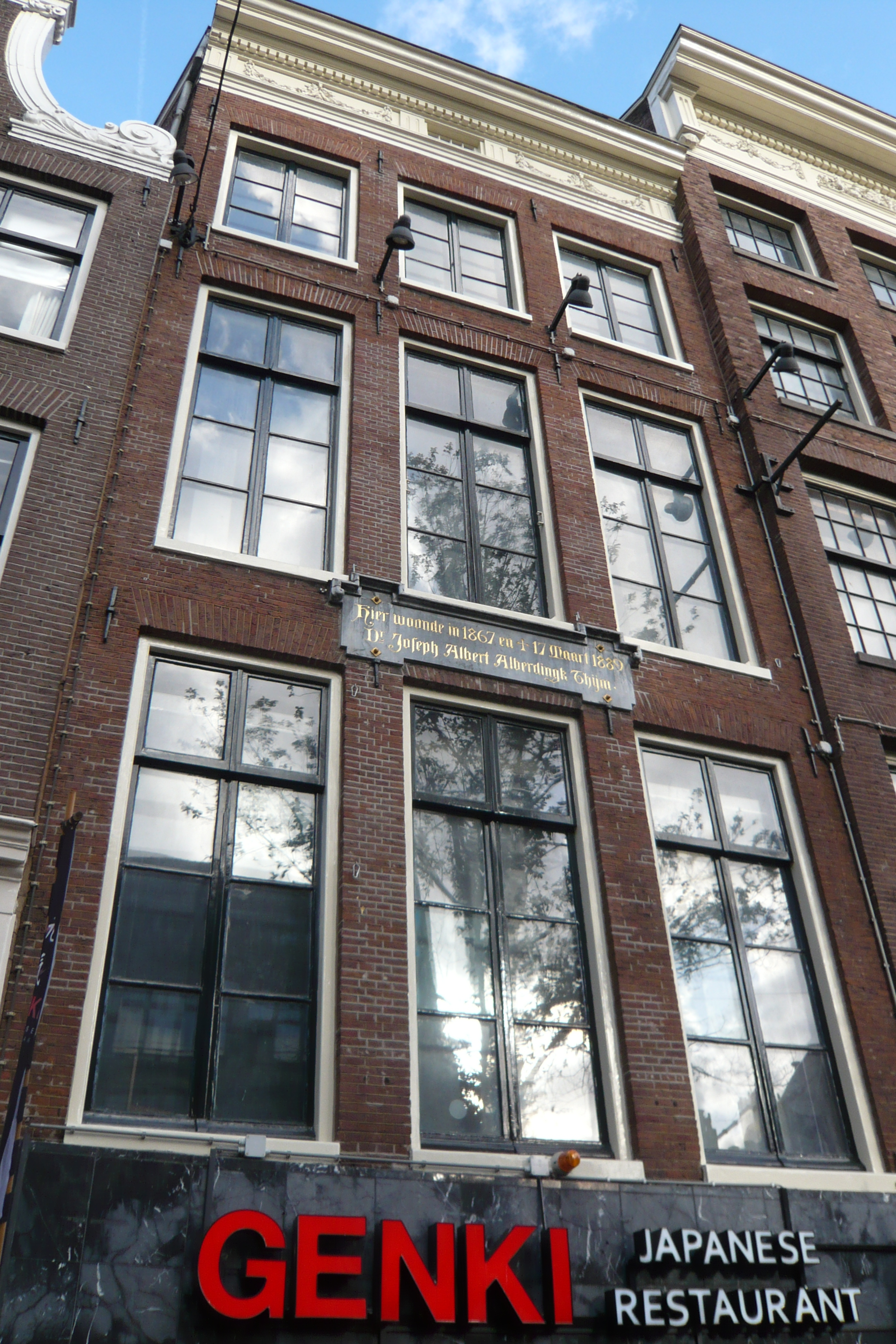 Nieuwezijds Voorburgwal, Amsterdam "Hier woonde in 1867 en stierf 17 Maart 1889 Dr. Joseph Albert Alberdingk Thijm."